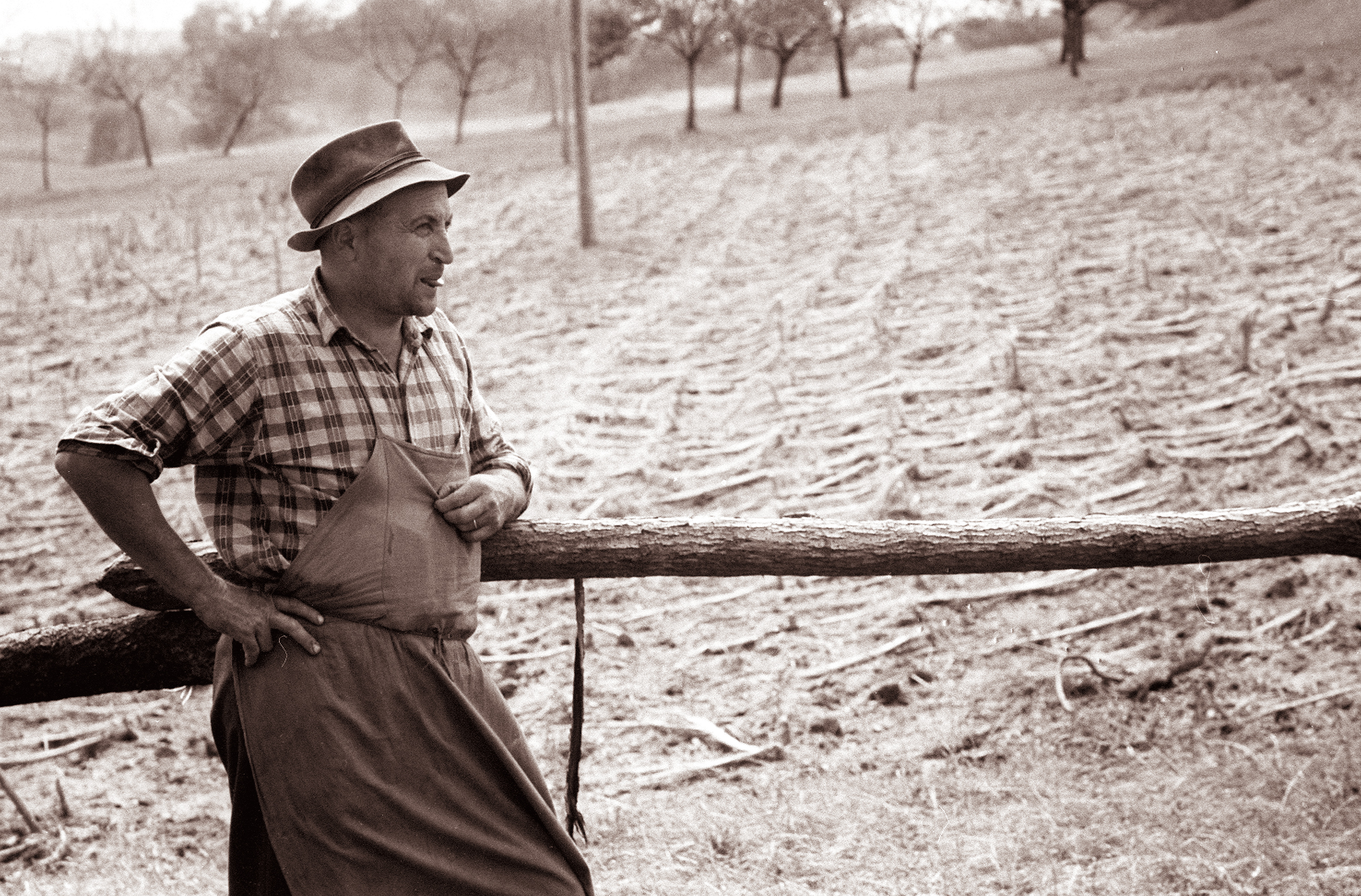 Po neurju v Slovenskih goricah